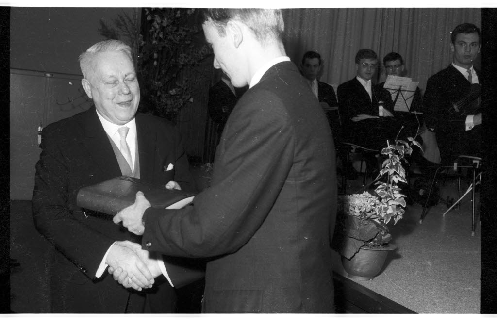 Feierstunde in der Aula. Verabschiedung vom (scheidenen) Dirketor Rudolf Wiggers (links).